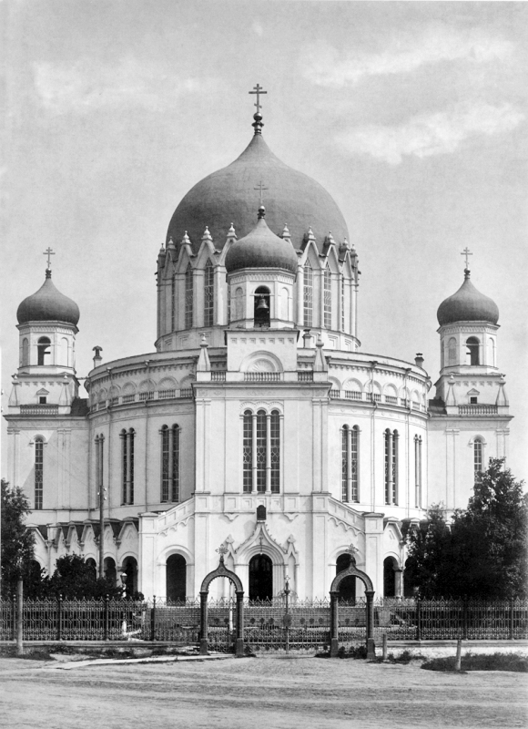 Alexandro-Nevskij sobor na Vyatke